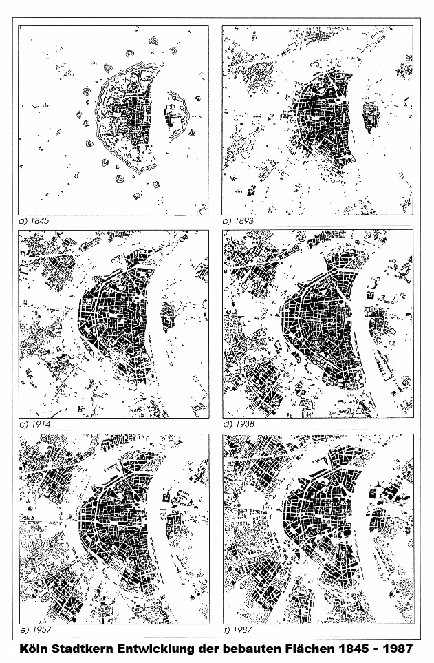 Köln: Entwicklung der Baustrukur